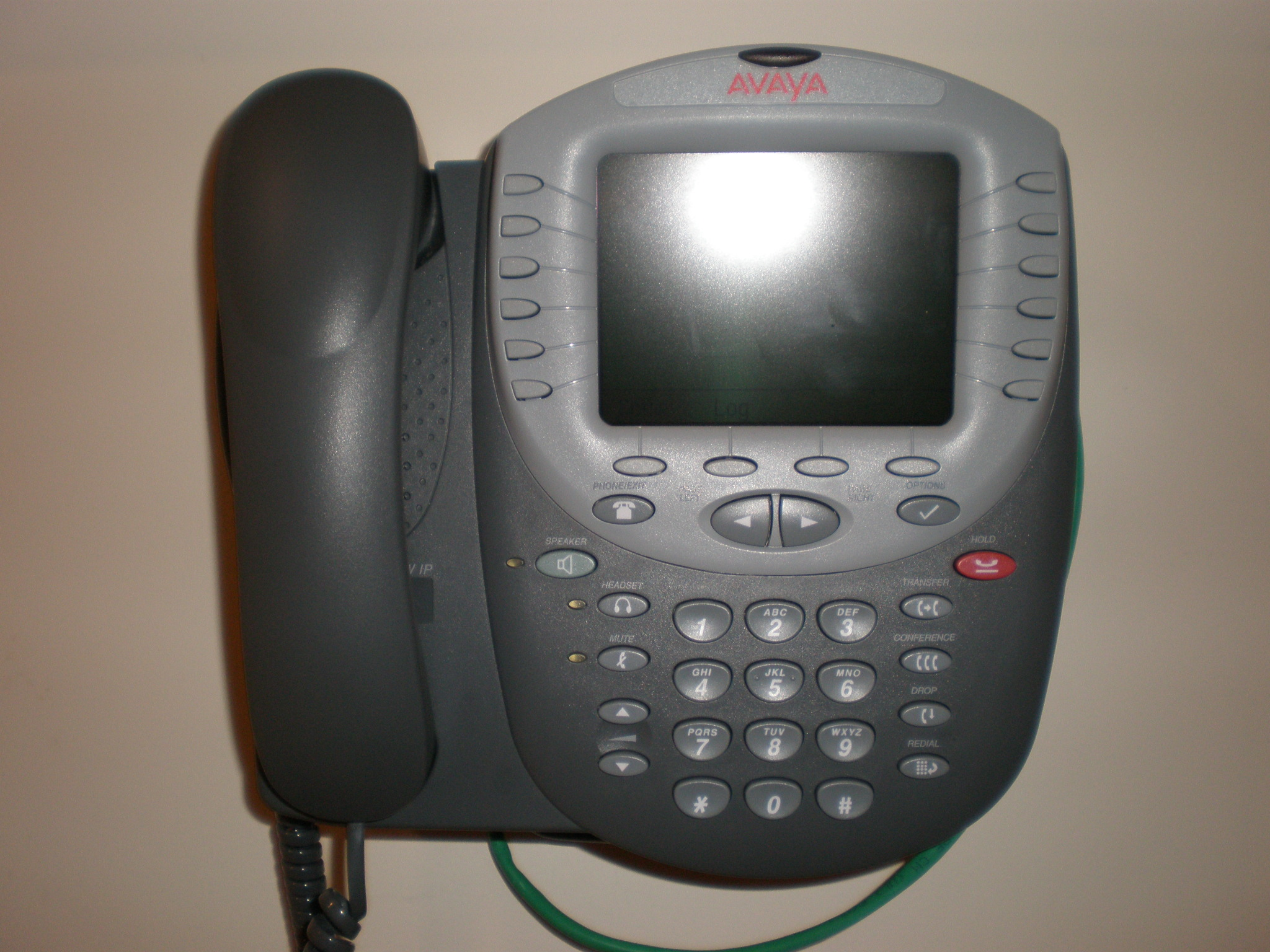 An Avaya 4625SW IP phone